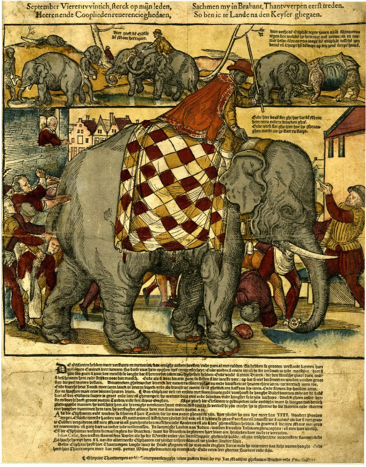 Elefant im Profil, gezeigt in Antwerpen 1563. Einblattdruck 40x33 cm. Holzschnitt, handkoloriert. British Museum, London